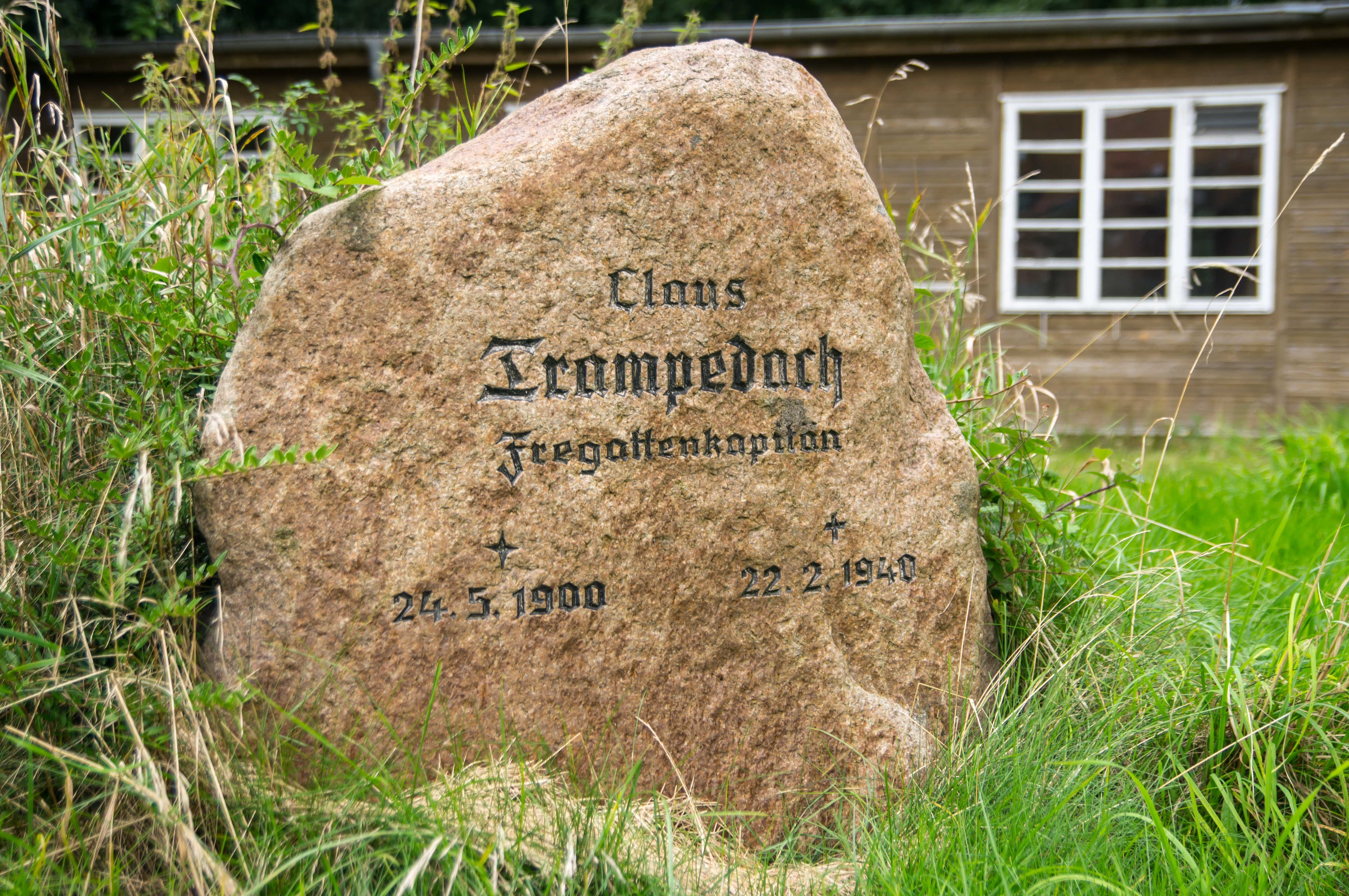 Flensburg-Mürwik; Kelmstrasse 14; Gedenkstein für Fregattenkapitän "Claus Trampedach", der am 22. Februar 1940 beim Untergang des Zerstörers "Z3 Max Schultz" ums Leben kam. Nach Trampedach wurde ein Barackenlager an der Marineschule Mürwik benannt.; Denkmal-Nr. 9,16. Der Gedenkstein wurde 1959 aufgestellt.